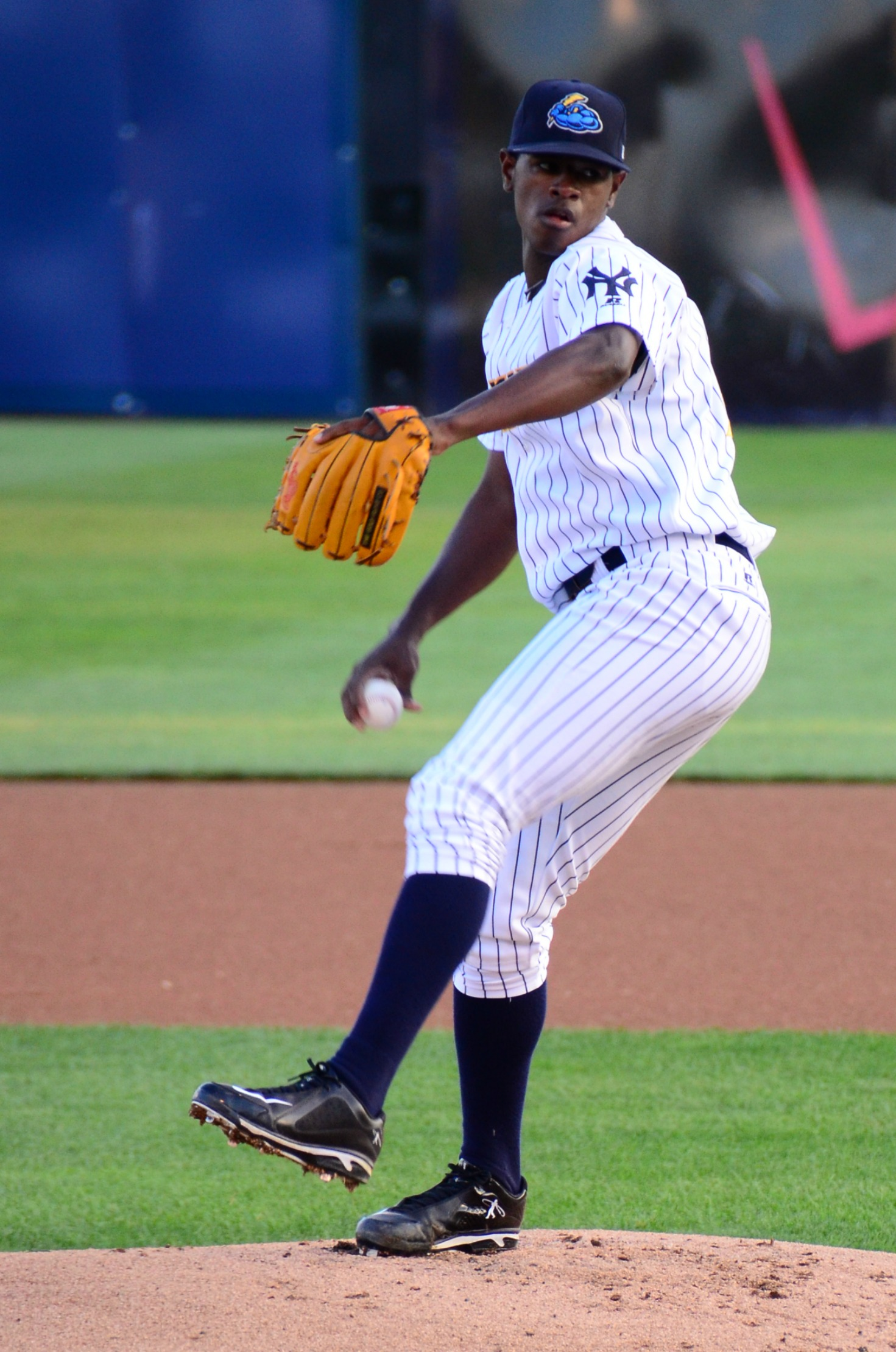 Luis Severino